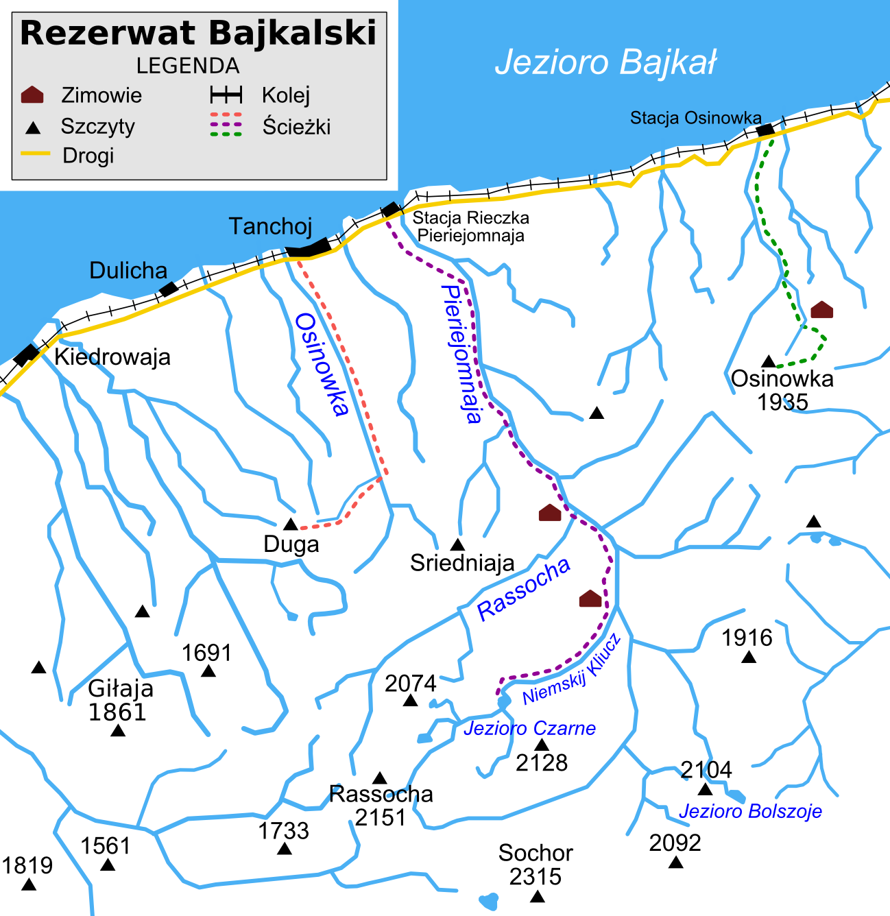 Rezerwat Bajkalski (pasmo Chamar-Daban)